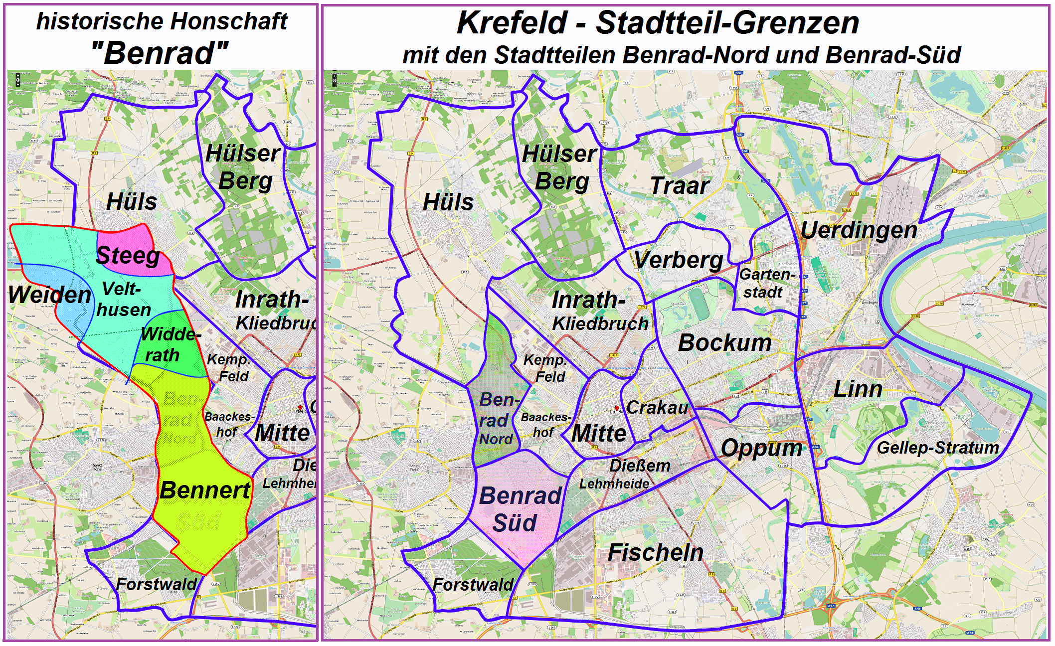 Historische Honschaft Benrad im Bereich der Stadt Krefeld This map of Historische Honschaft Benrad im Bereich der heutigen Stadt Krefeld was created from OpenStreetMap project data, collected by the community. This map may be incomplete, and may contain errors. Don't rely solely on it for navigation.